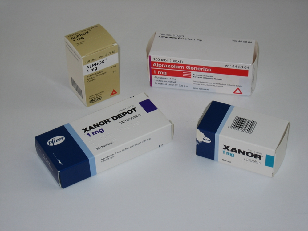 Alpratsolaamivalmisteita / Alprazolam products